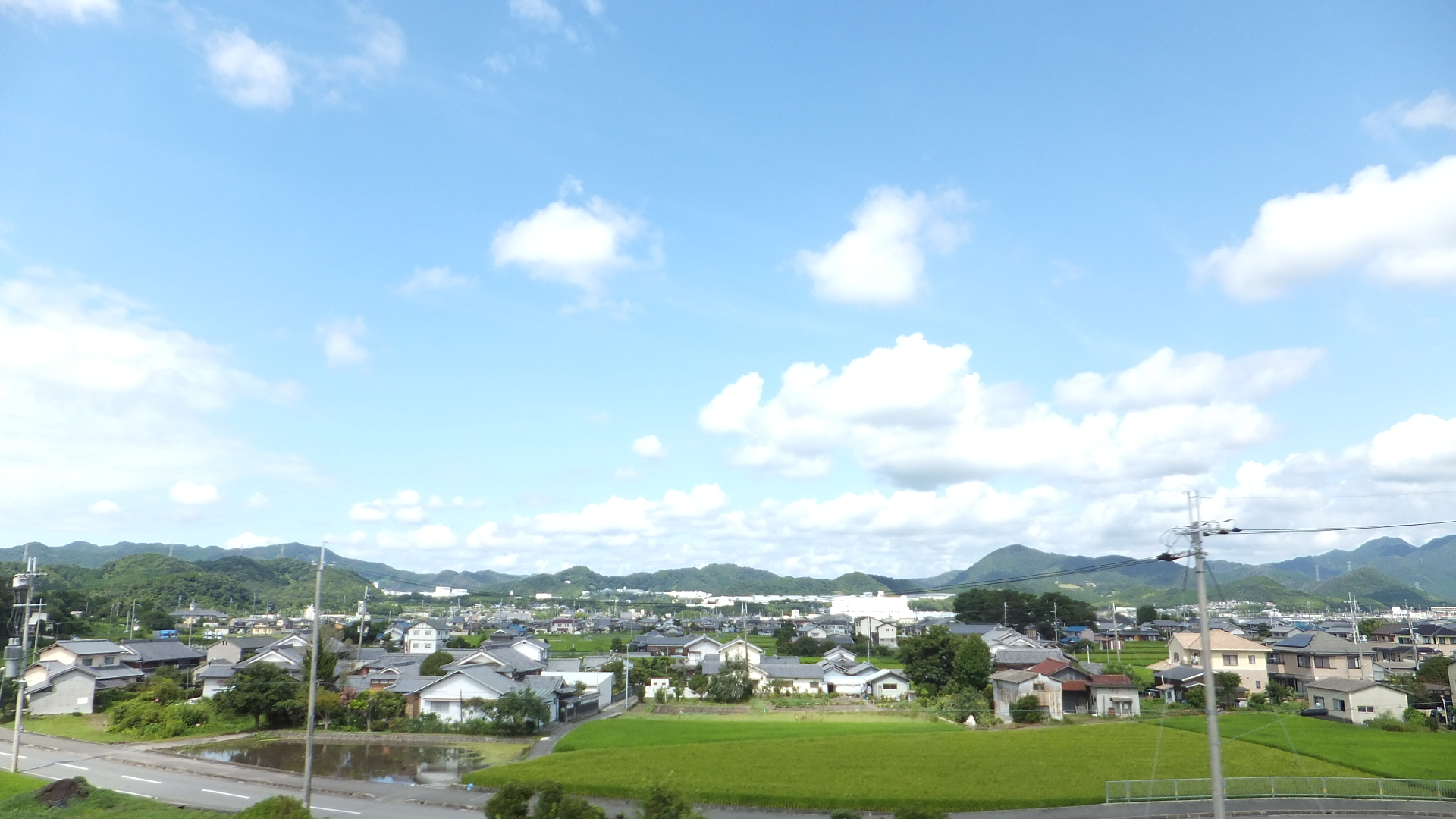 兵庫県神崎郡福崎町南田原